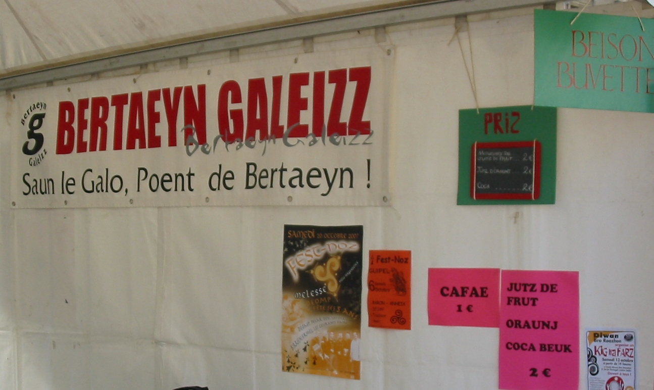 Êcritchieau à la Fête Mill Góll en Pays Gallo 2007